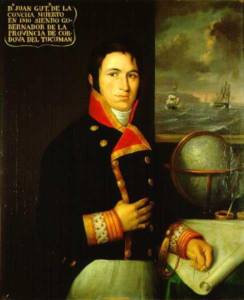 Retrato del marino español Juan Gutiérrez de la Concha (1760-1810) que llegó a ser brigadier de la Real Armada Española y gobernador de Córdoba de la Nueva Andalucía. Murió fusilado en agosto de 1810 junto a Santiago de Liniers por orden de la Primera Junta y por su lealtad a la causa del rey Fernando VII de España y de los españoles.